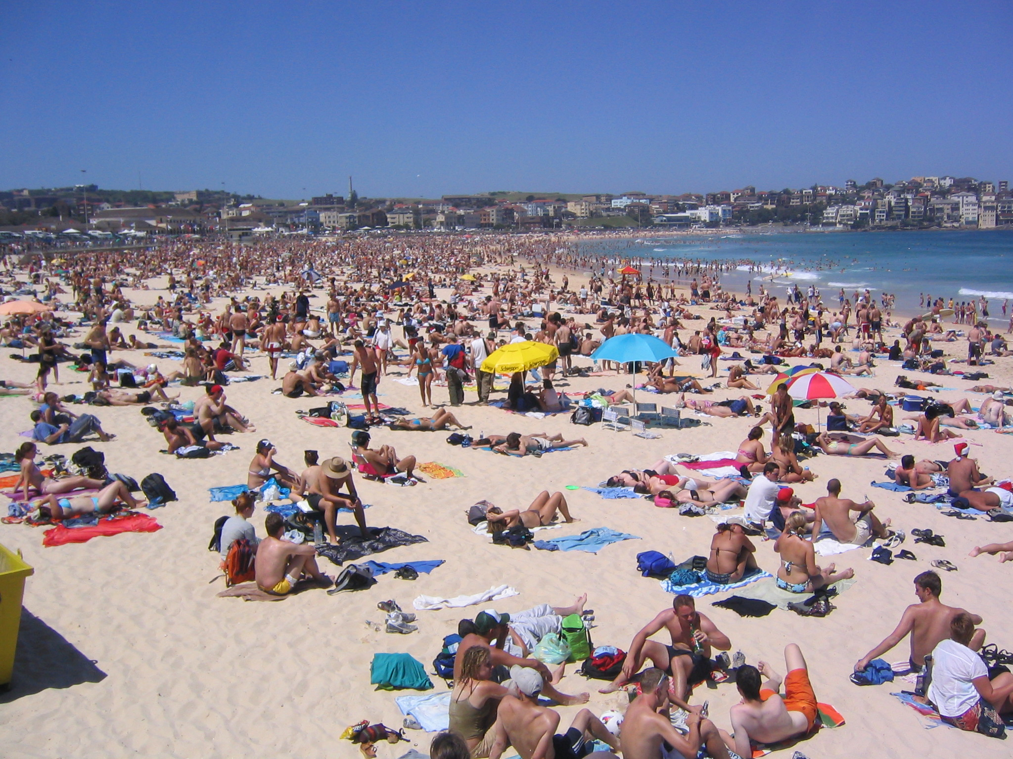 Bondi Beach